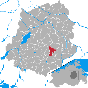 Tützpatz, Landkreis Demmin, Mecklenburg-Vorpommern